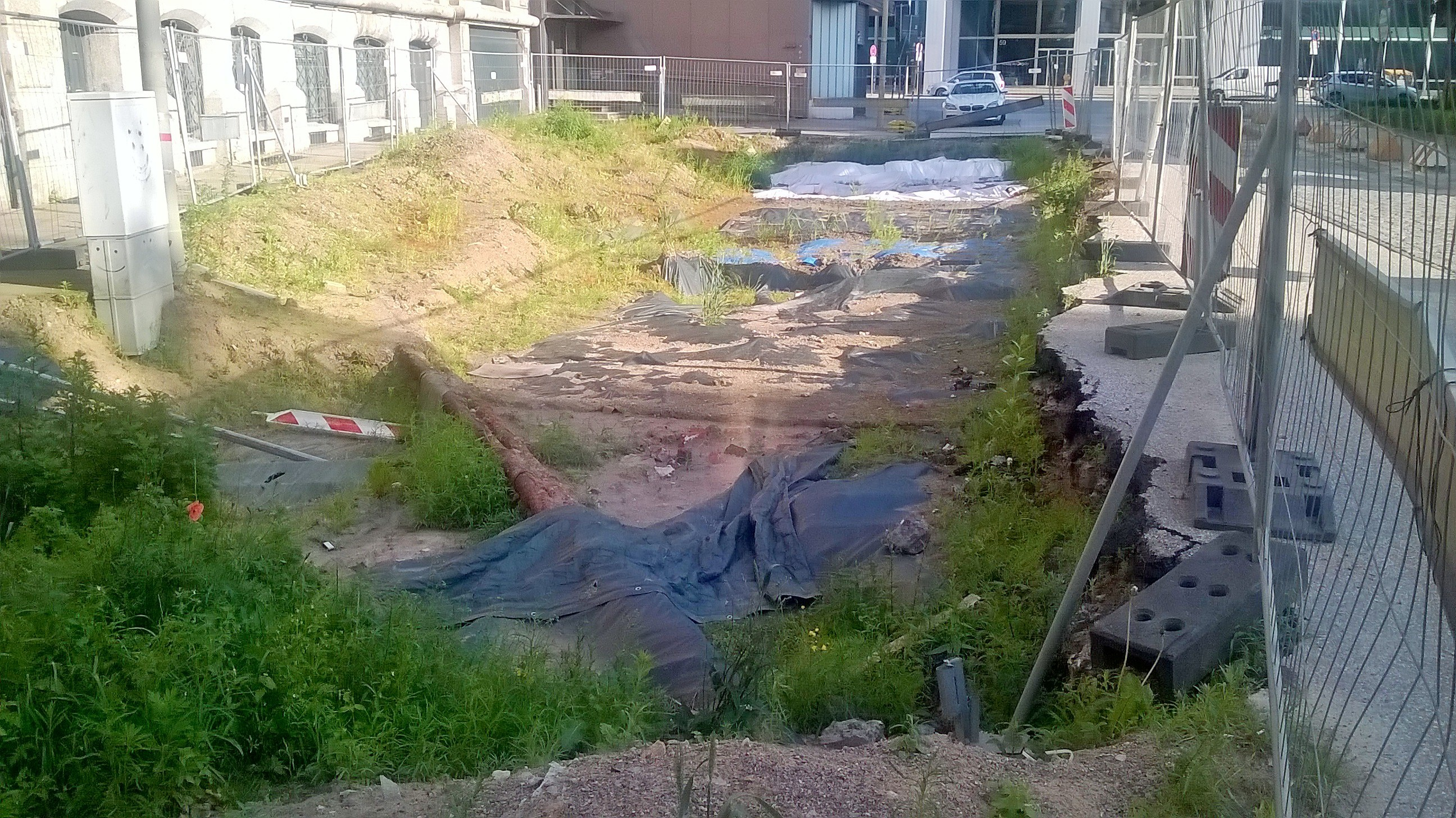 Ausgrabungsstelle "Neue Burg" in Hamburg, zwischen Nikolaifleet (Laeiszhof) und Ruine der Nikolaikirche, Zustand Juni 2019